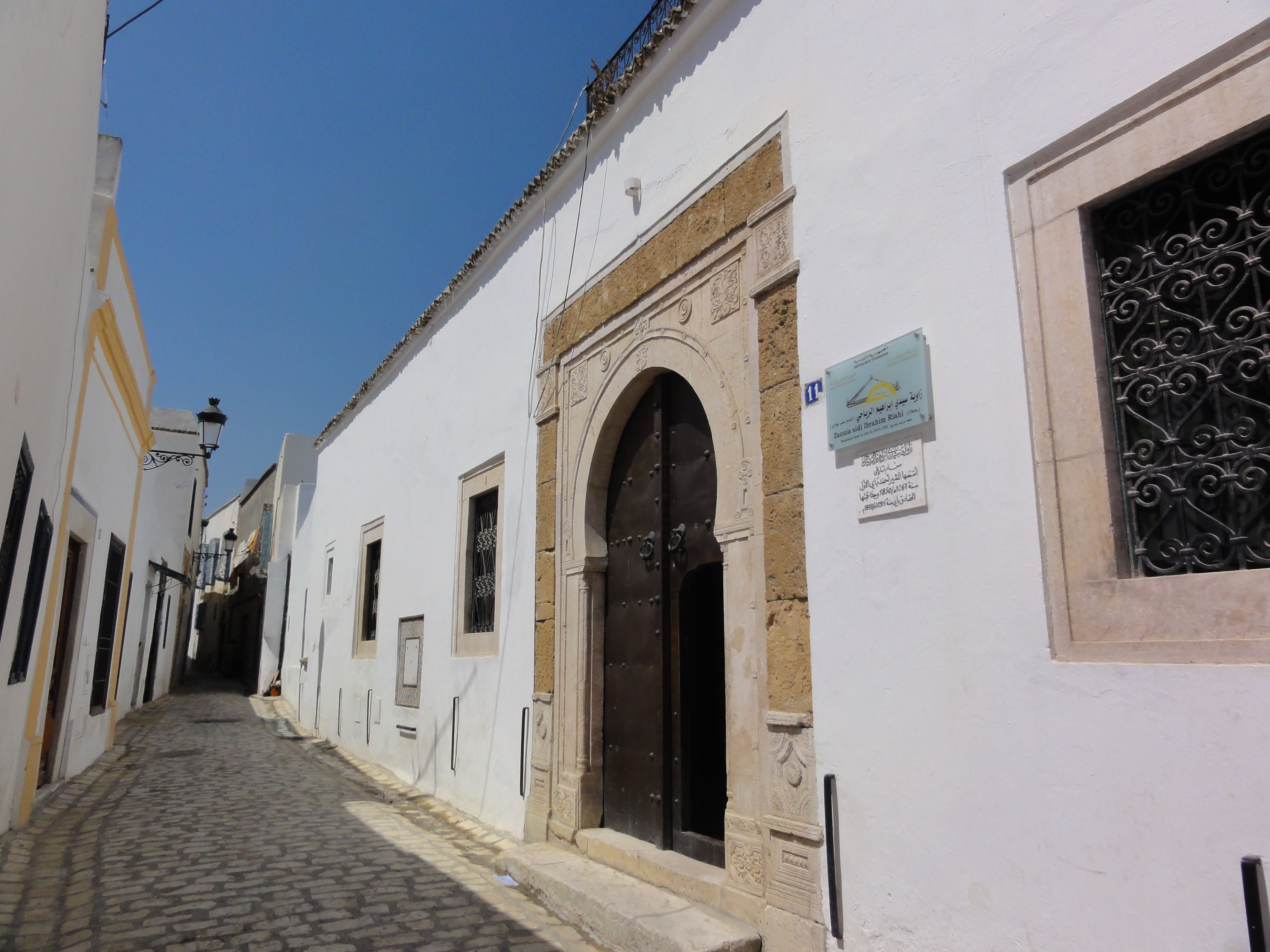 Entrée de la zaouïa de Sidi Brahim Riahi sur la rue Sidi Brahiz (médina de Tunis)